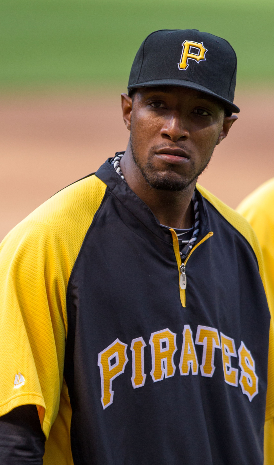 James McDonald